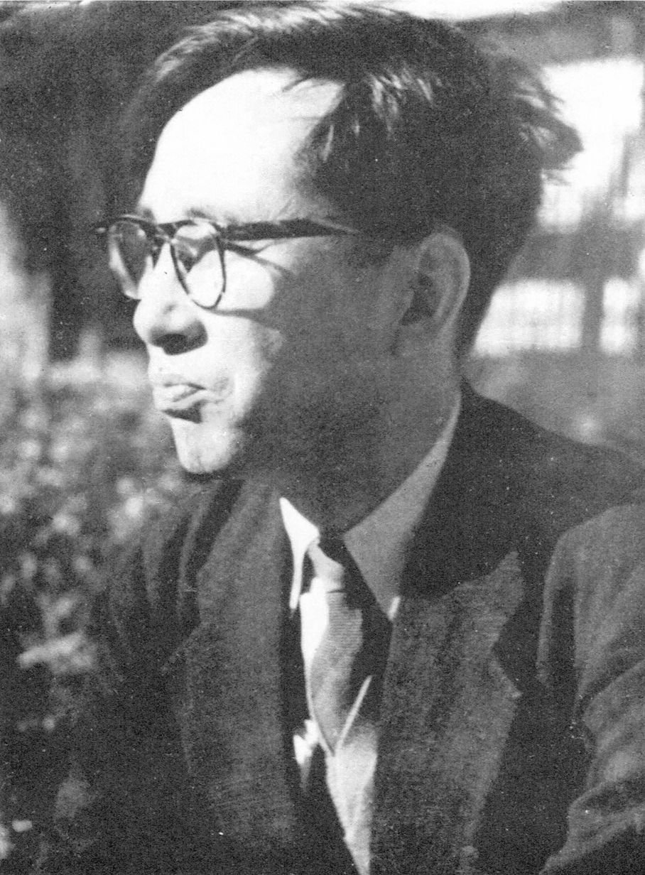 東京創元社『定本宮柊二全歌集』（1956）より宮柊二